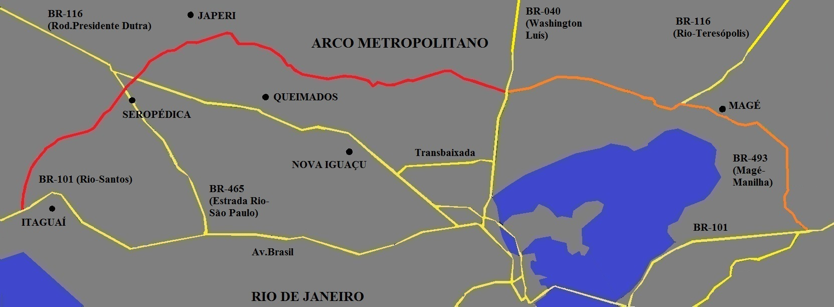 Arco Metropolitano do Rio de Janeiro. Trecho vermelho em construção, em 2013. O trecho laranja já existe, e faz parte das BRs 116 e 493, e será incorporado como parte do Arco.